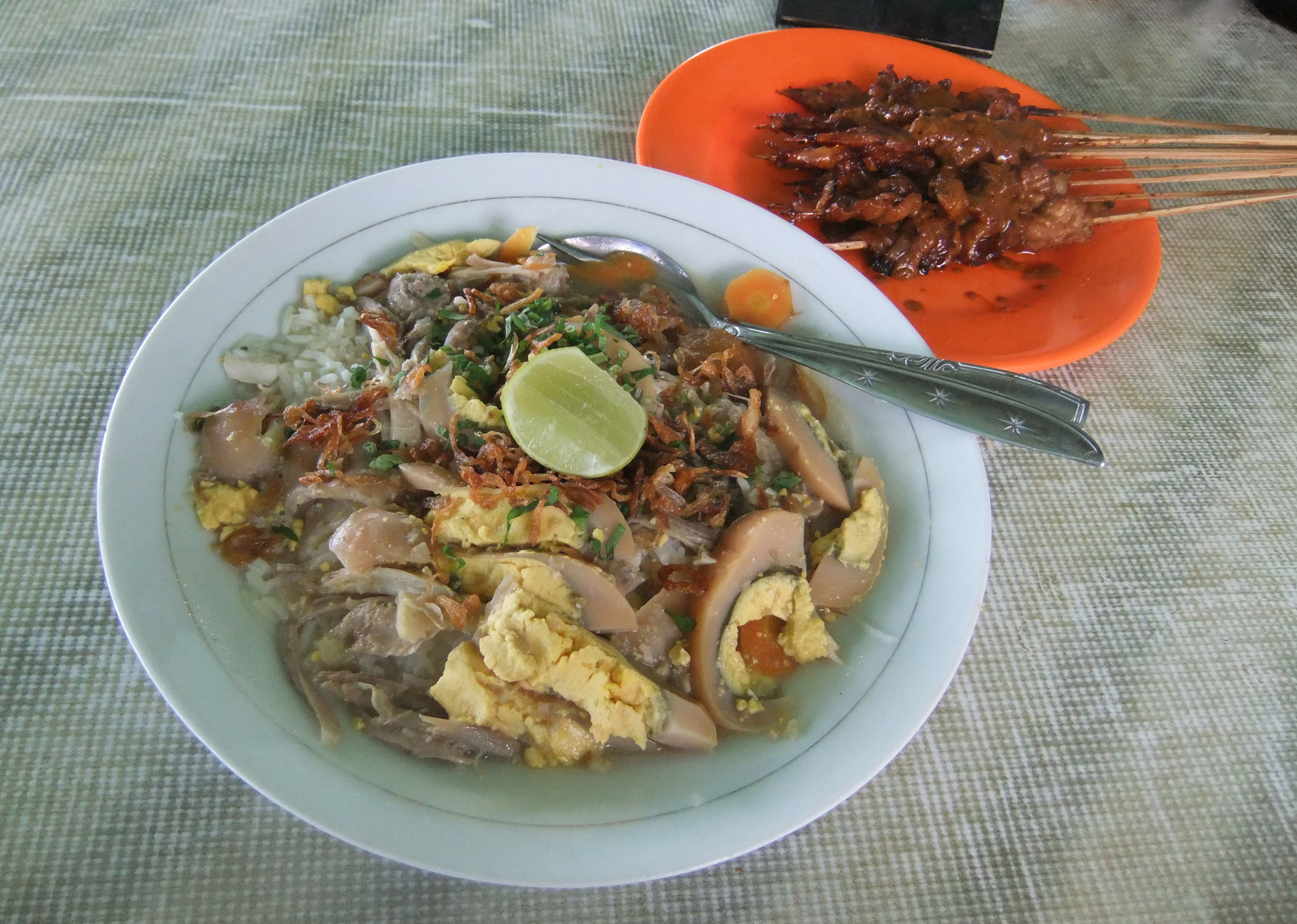 Sop Banjar Pak Amat, Banjarmasin